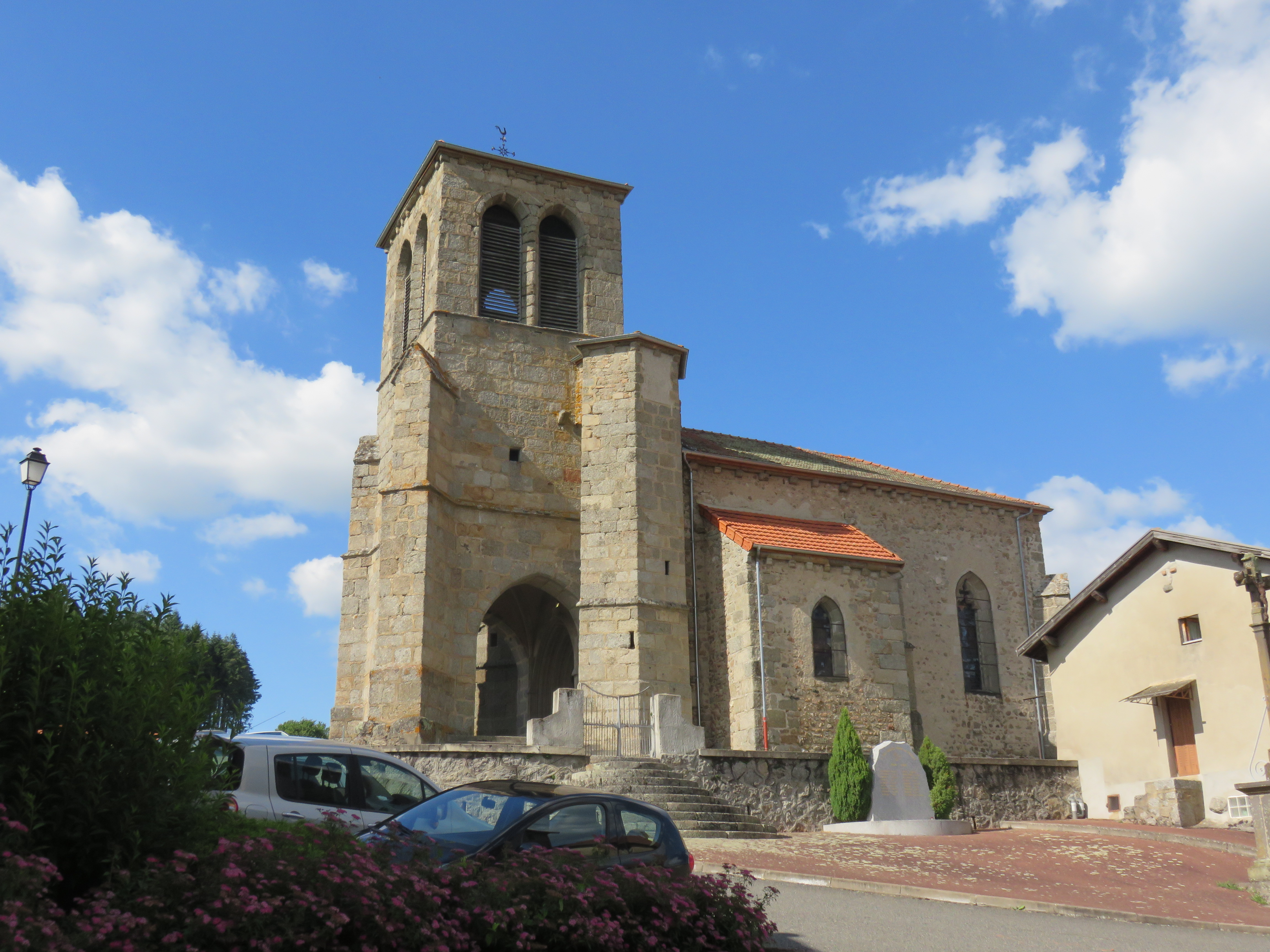 Église Saint-Prix de Saint-Priest-la-Vêtre (Loire, France).